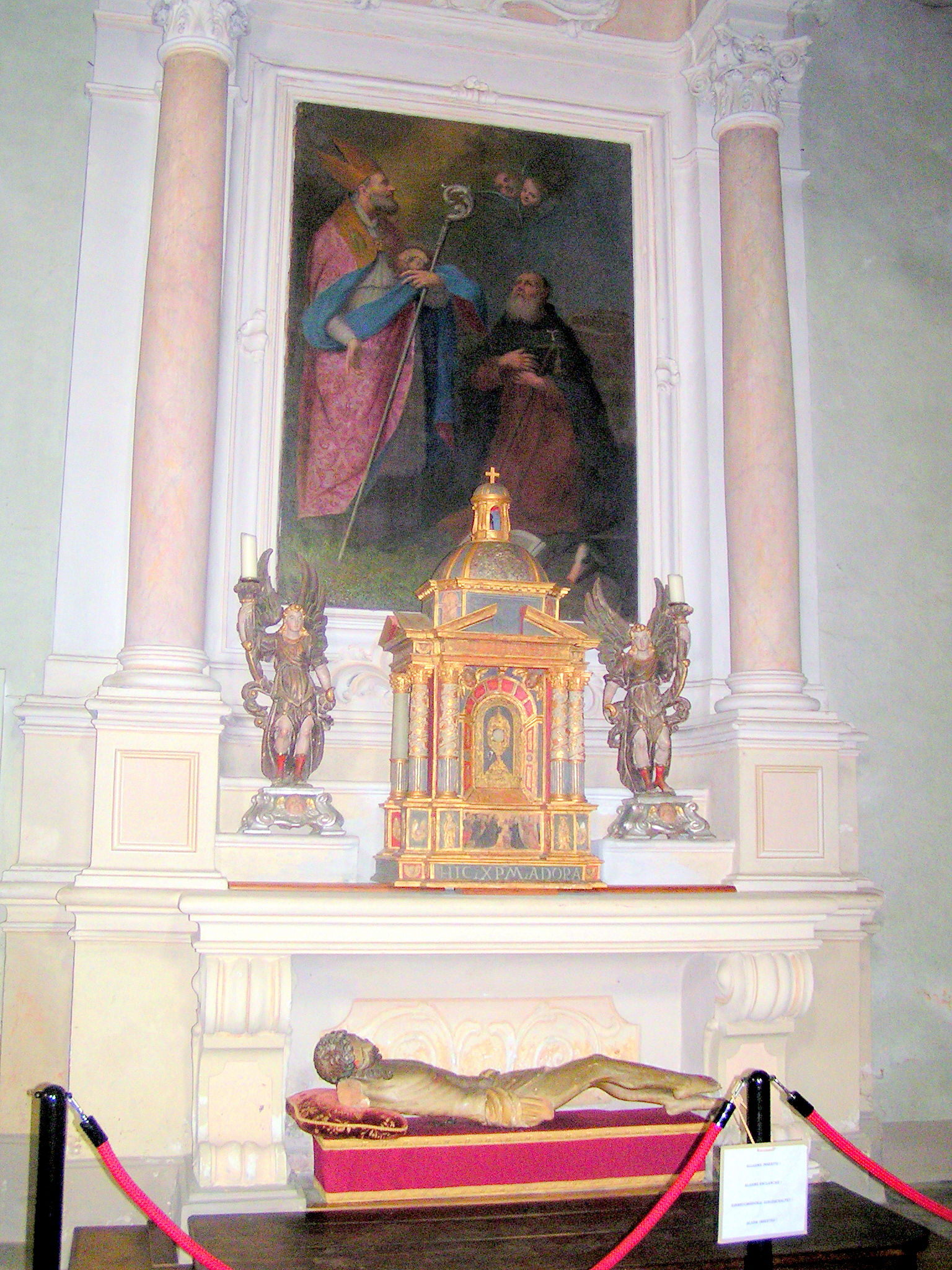 Cappella di destra: olio su tela raffigurante San Grato e Sant'Antonio abate, della seconda metà del secolo XVII, e una scultura lignea del Cristo morto della prima metà del secolo XVI.